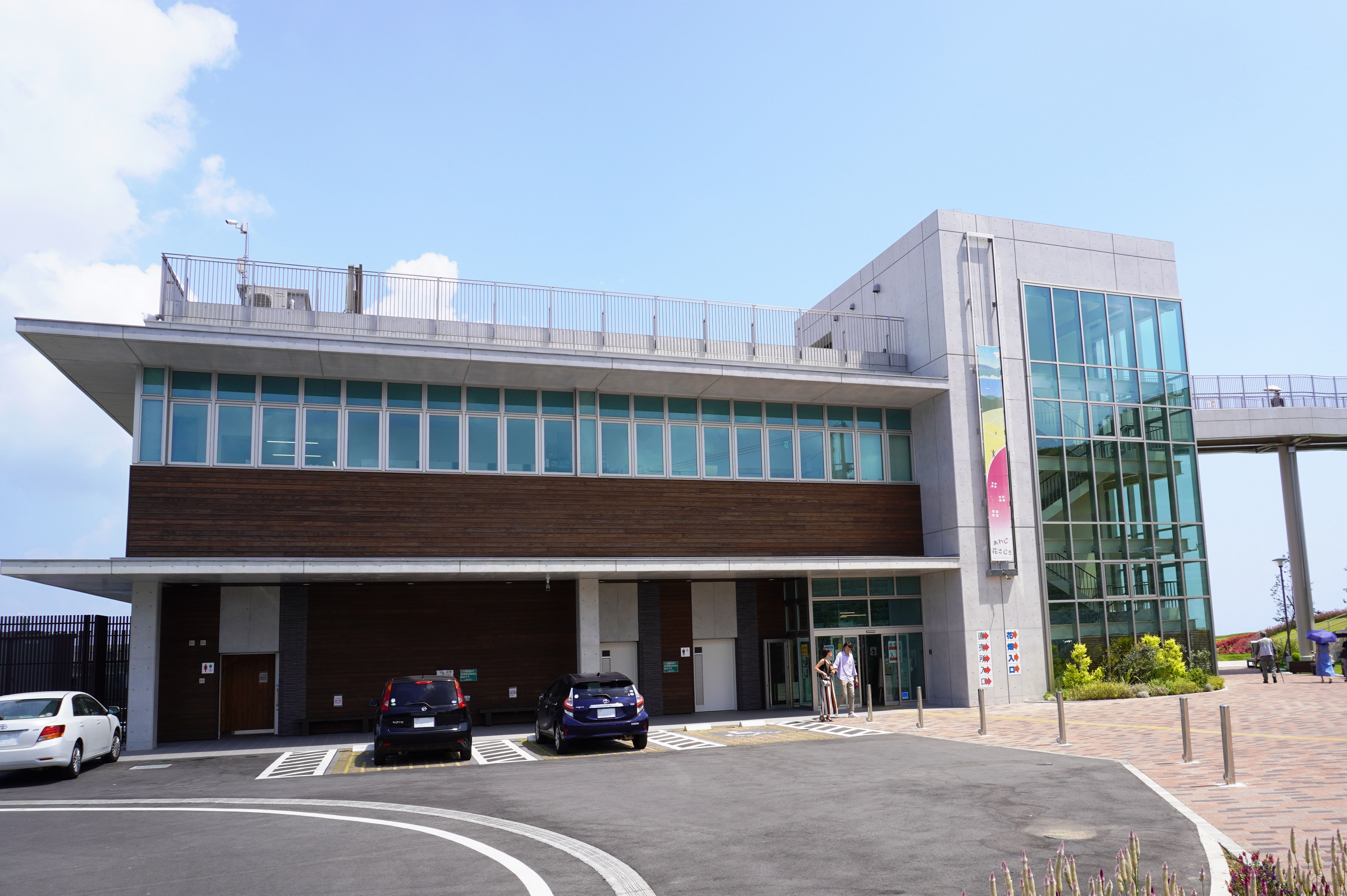 あわじ花さじきテラス館